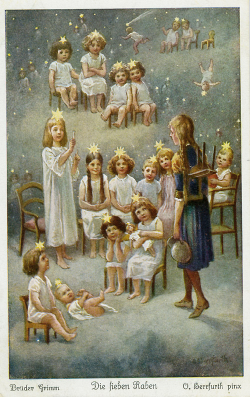 Die sieben Raben. Postkartenserie nach dem Märchen. Serie von sechs Postkarten der Firma Uvachrom. Serie 320, Nr. 4891. Text der Rückseite: Schwesterchen kam auf der Suche nach den sieben Brüdern zu den Sternen. Die waren freundlich und gut. Jeder Stern saß auf einem besonderen Stühlchen. Der Morgenstern schenkte ihm ein Schlüsselchen für den Glasberg und sagte ihm, dass dort die Brüder als Raben lebten.